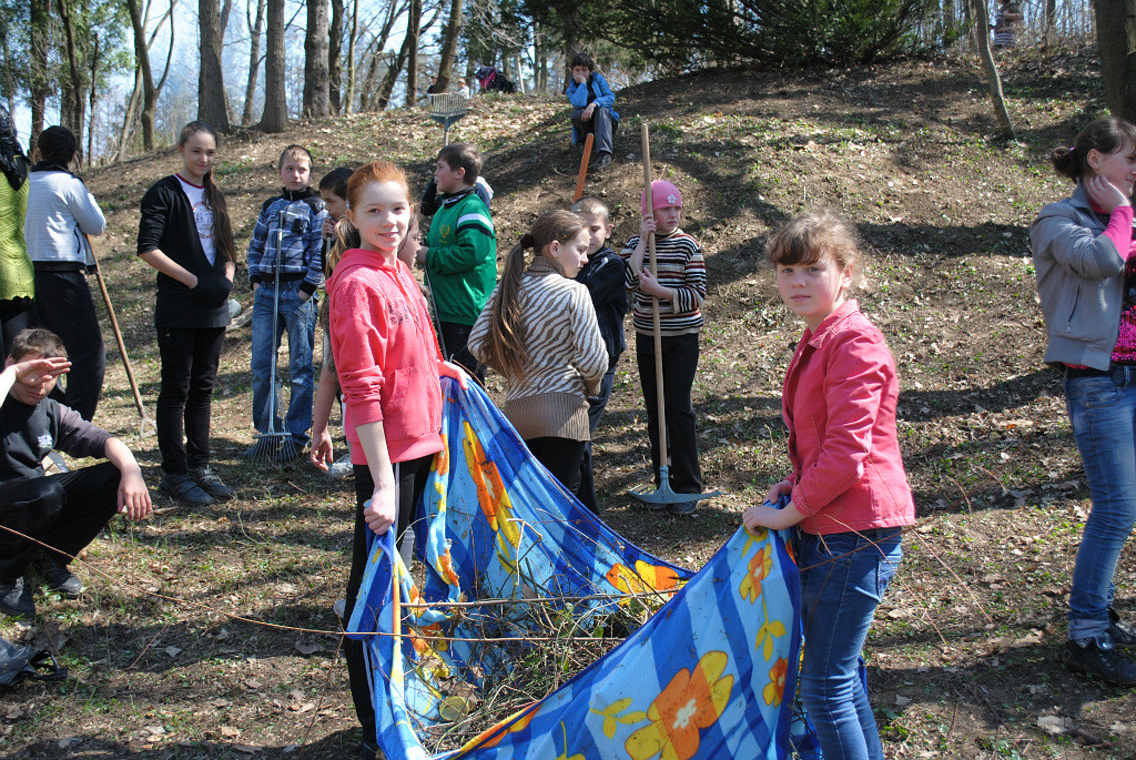 Прибирання дендропарку 2013.